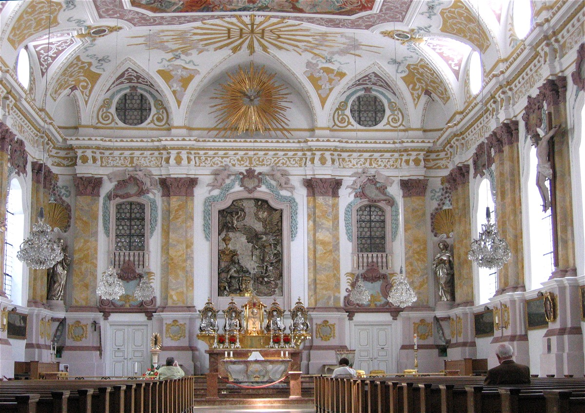 Bürgersaalkirche in München